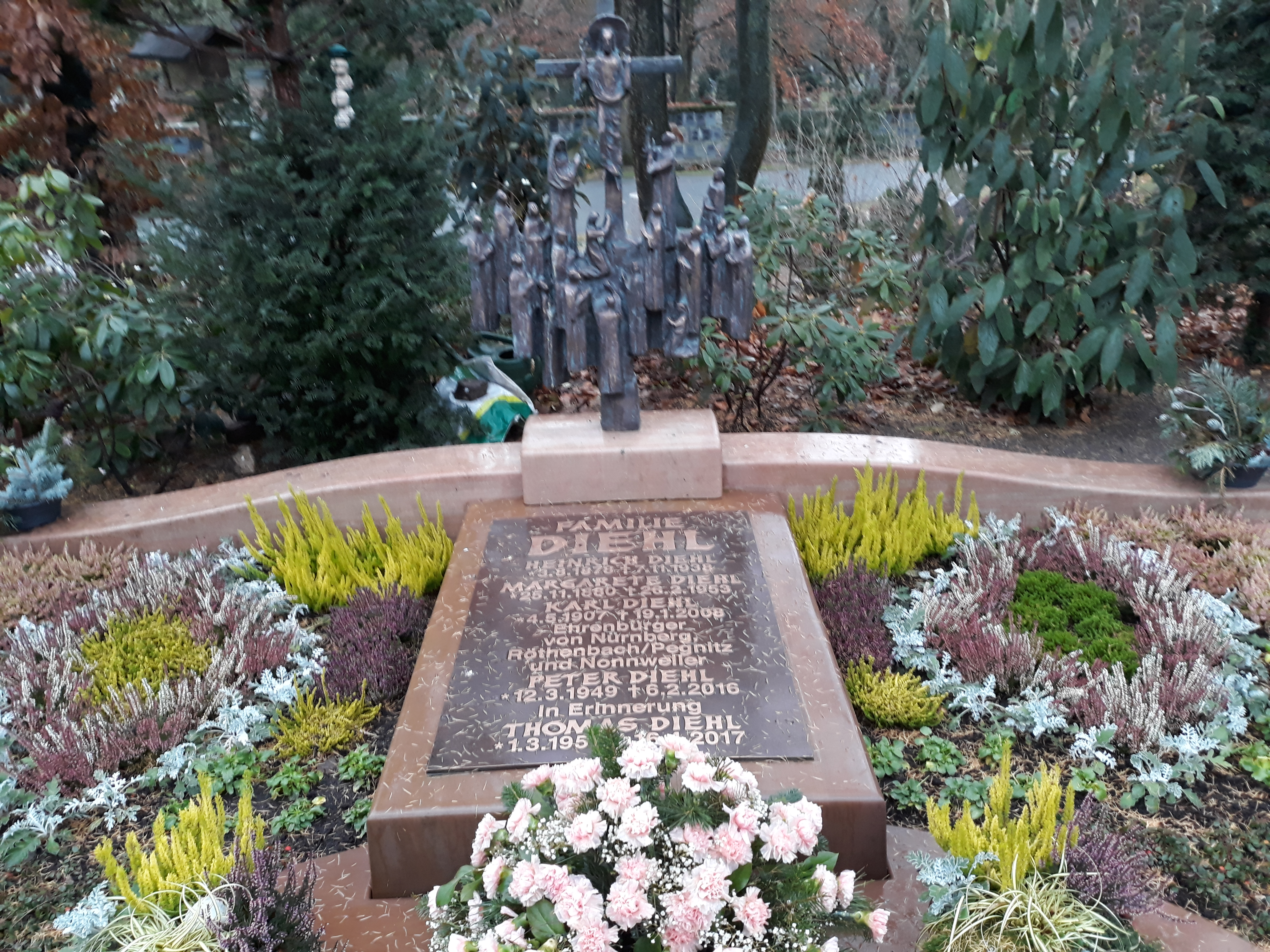 Das Grab der Unternehmerfamilie Diehl (darunter Karl Diehl) auf dem Westfriedhof Nürnberg.